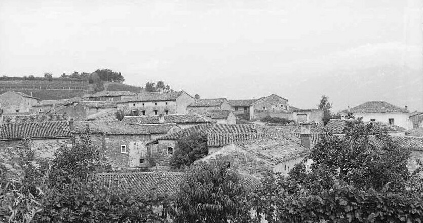 Del vasi Podraga.